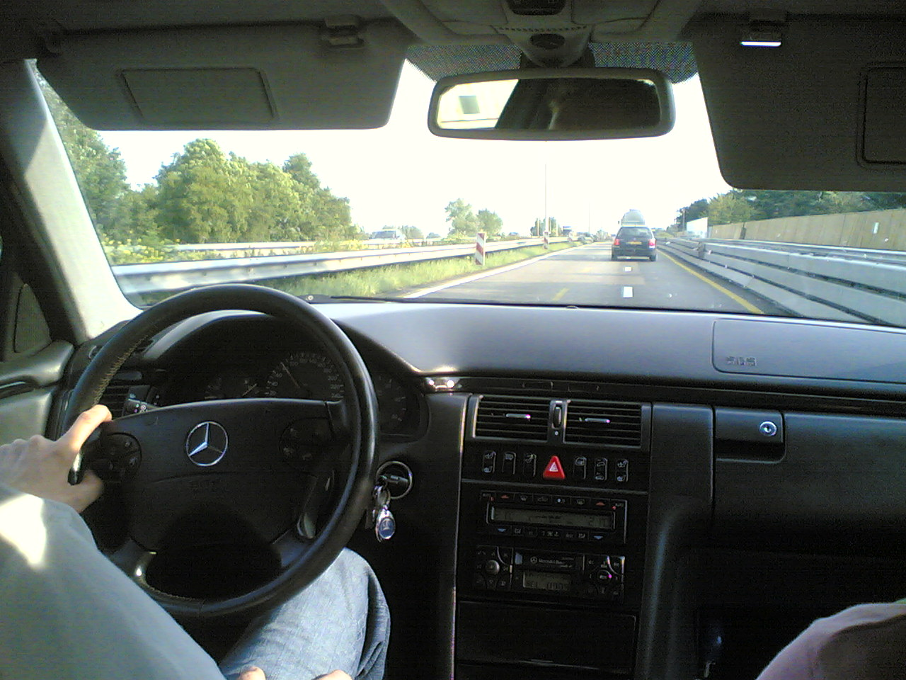 Interieur van een Mercedes W210 uit 2001. Hier in de uitvoering 'Avantgarde'